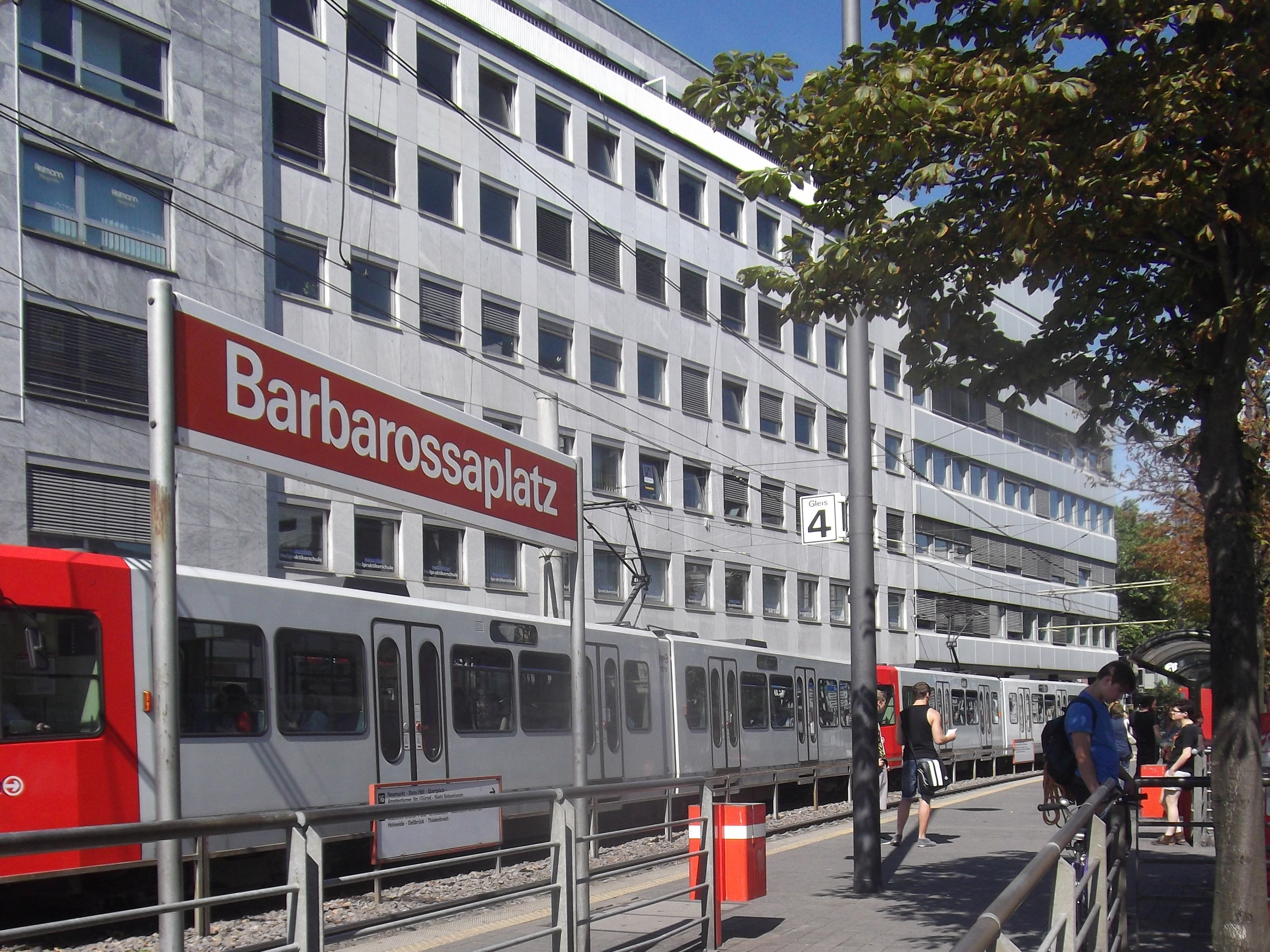 KVB station Barbarossaplatz (Köln)